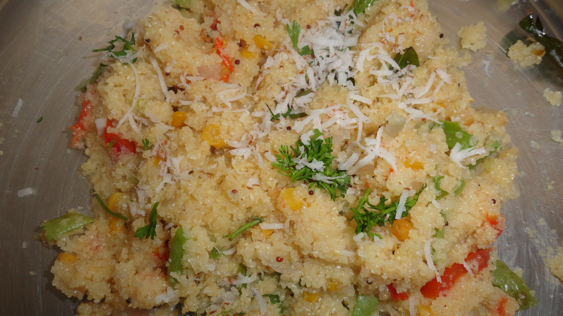 ಕನ್ನಡ: ಕಾಯಿ ತುರಿ ಮತ್ತು ಕೊತಂಬರಿ ಬೆರೆತ ಉಪ್ಪಿಟ್ಟು